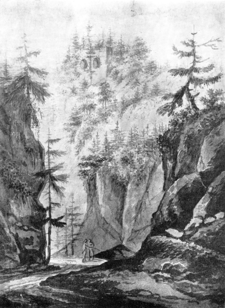 Pustý žleb se Starými zámky - hradem Blansekem 1833